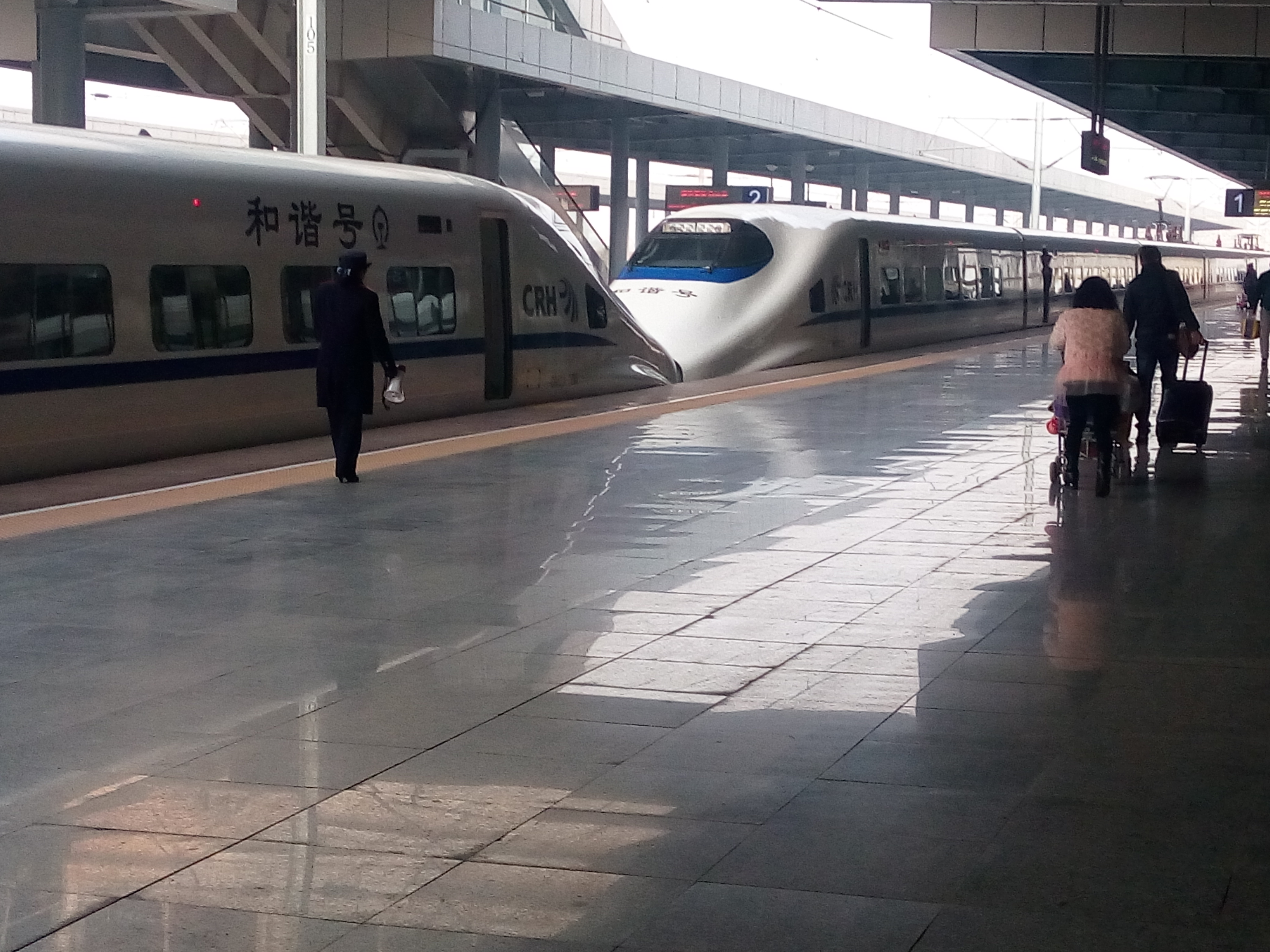 停靠在抚州站1站台重联的CRH2